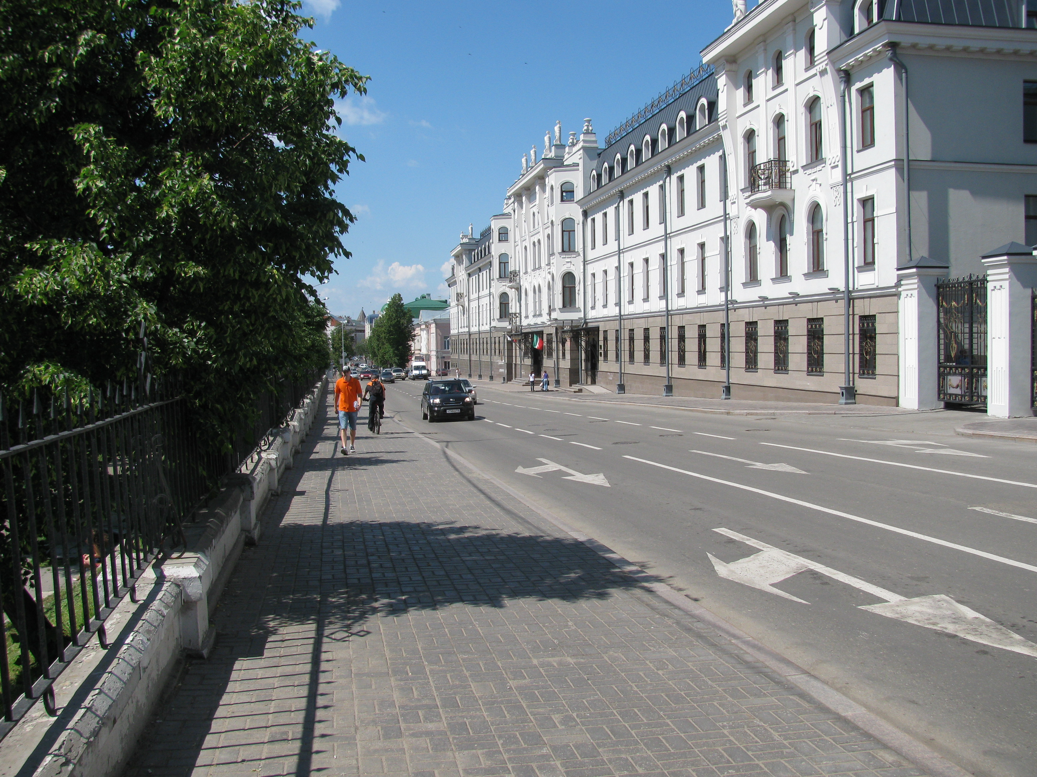 Улица Дзержинского нечетная сторона